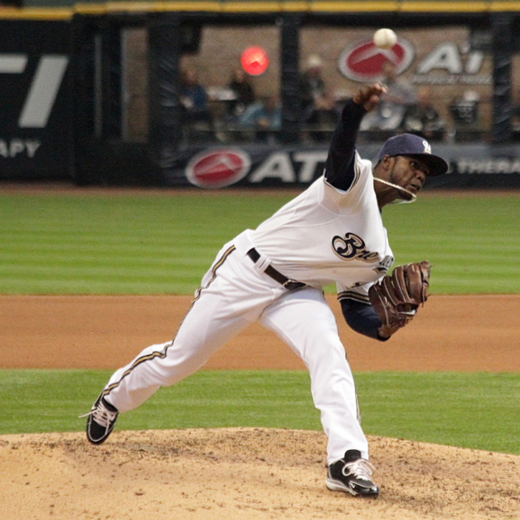 Alfredo Fígaro